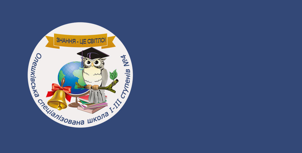 Прапор Олешківської СШ №4